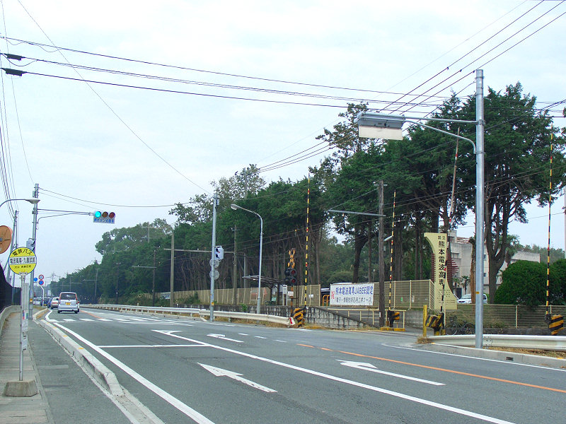 熊本電気鉄道電波高専前駅 奥が御代志駅方面、手前が北熊本駅方面。 撮影者/著者/著作権保有者 : MK Products (本人がアップロード) 撮影日 : 2006/09/24 電波高専前駅用にアップロードした画像です。良い画像があれば別の画像に変えてください。